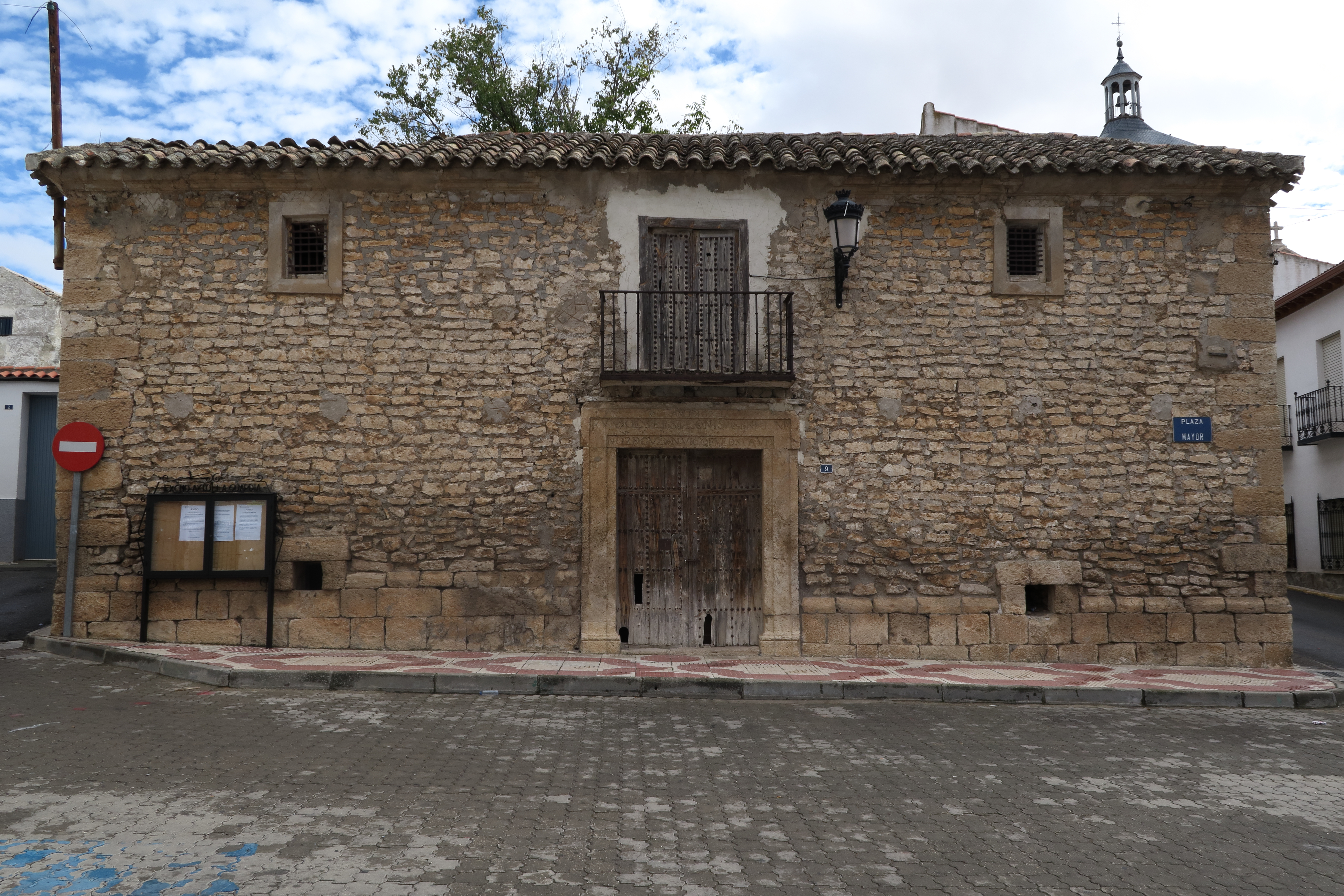 Pósito de La Guardia, edificio del antiguo depósito de cereal de carácter municipal cuya función primordial consistía en realizar préstamos de cereal en condiciones módicas a los vecinos necesitados.